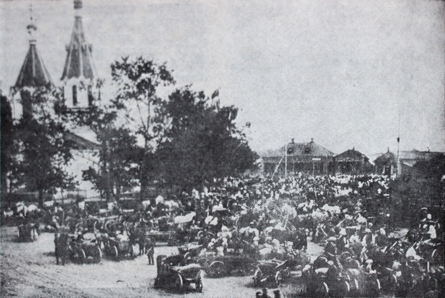 Беларуская (тарашкевіца): Маладэчна (Maładečna), рог вуліц Віленскай (vulica Vilenskaja) і Замкавай (vulica Zamkavaja). Пакроўская царква-мураўёўка